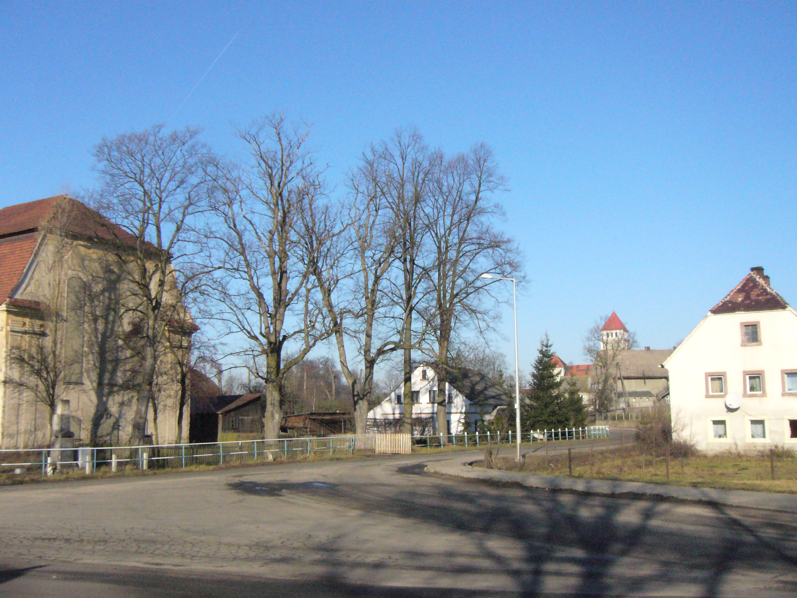 Ocice, wieś w powiecie bolesławieckim